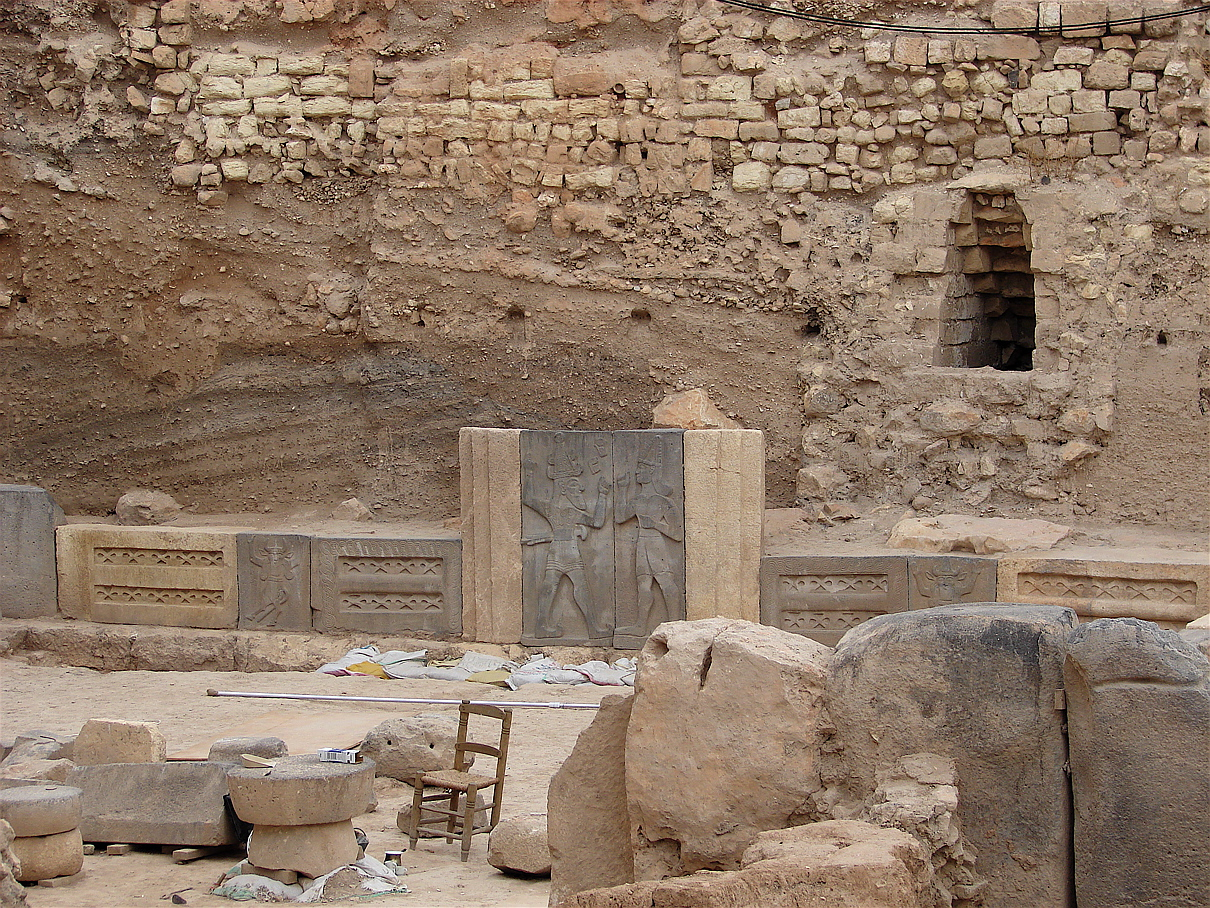 Udgravning på Citadellet i Aleppo